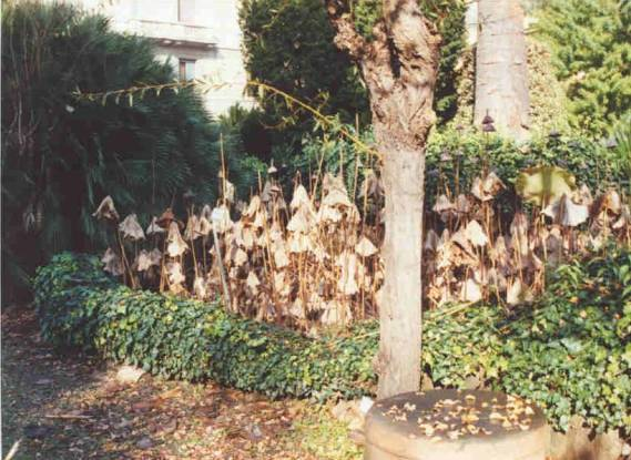 Laghetto del Giardino dei Semplici di Firenze; piante di loto a riposo (Nelumbo nucifera)